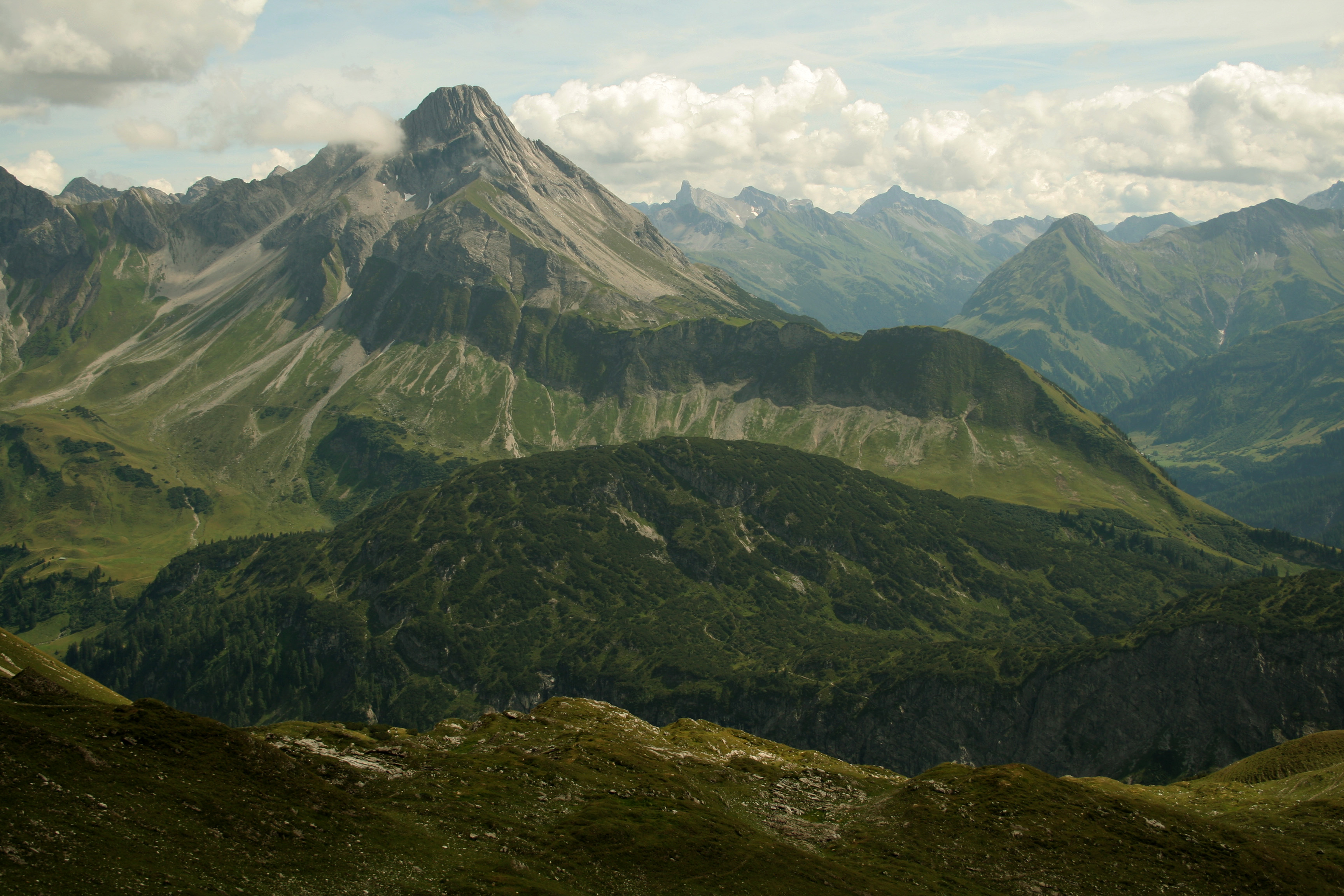 Biberkopf vom Wildengrund (Nahe Mindelheimer Hütte) aus gesehen